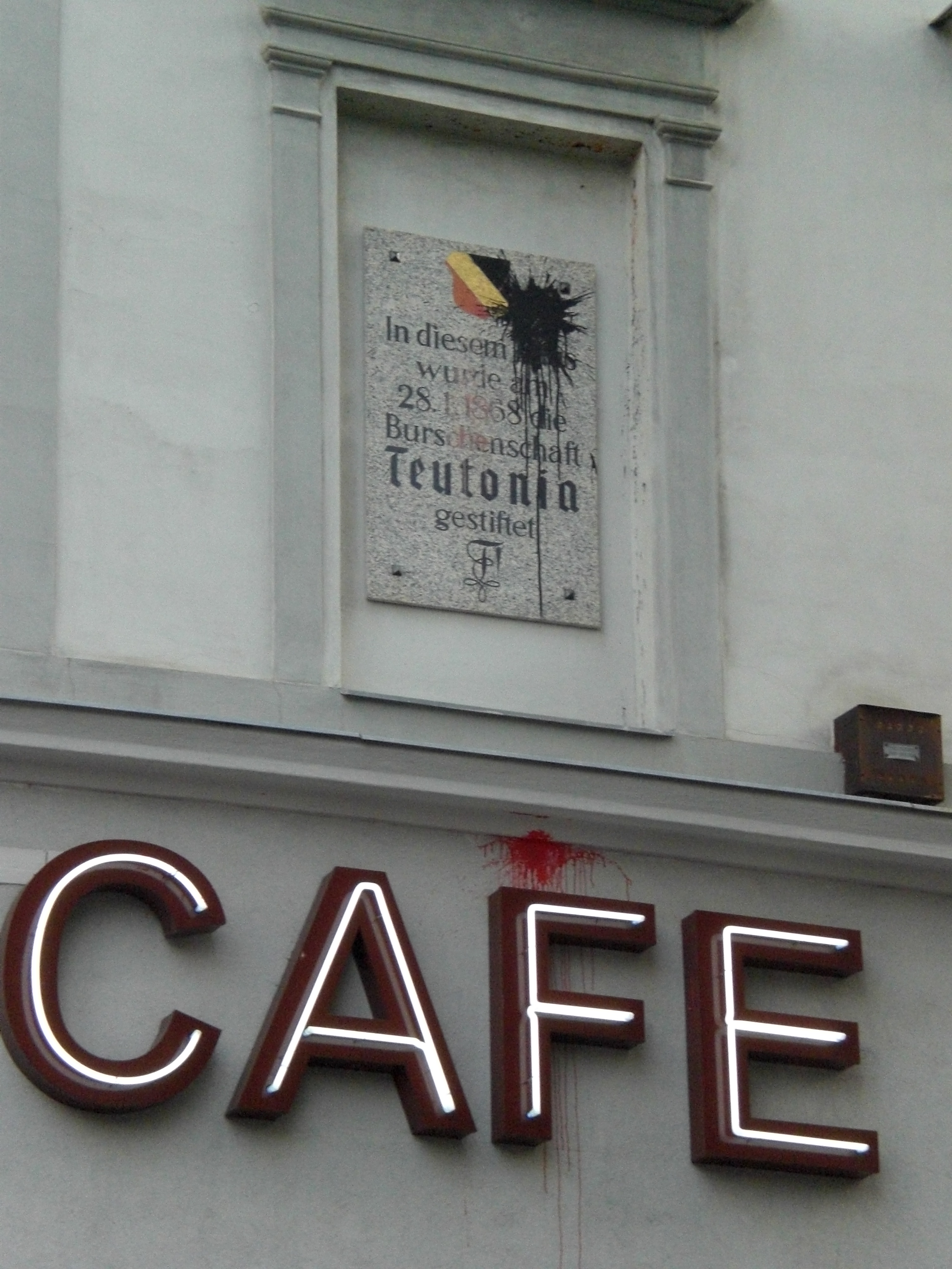 Gründungstafel der Burschenschaft Teutonia Wien nach einem Farbbeutelanschlag